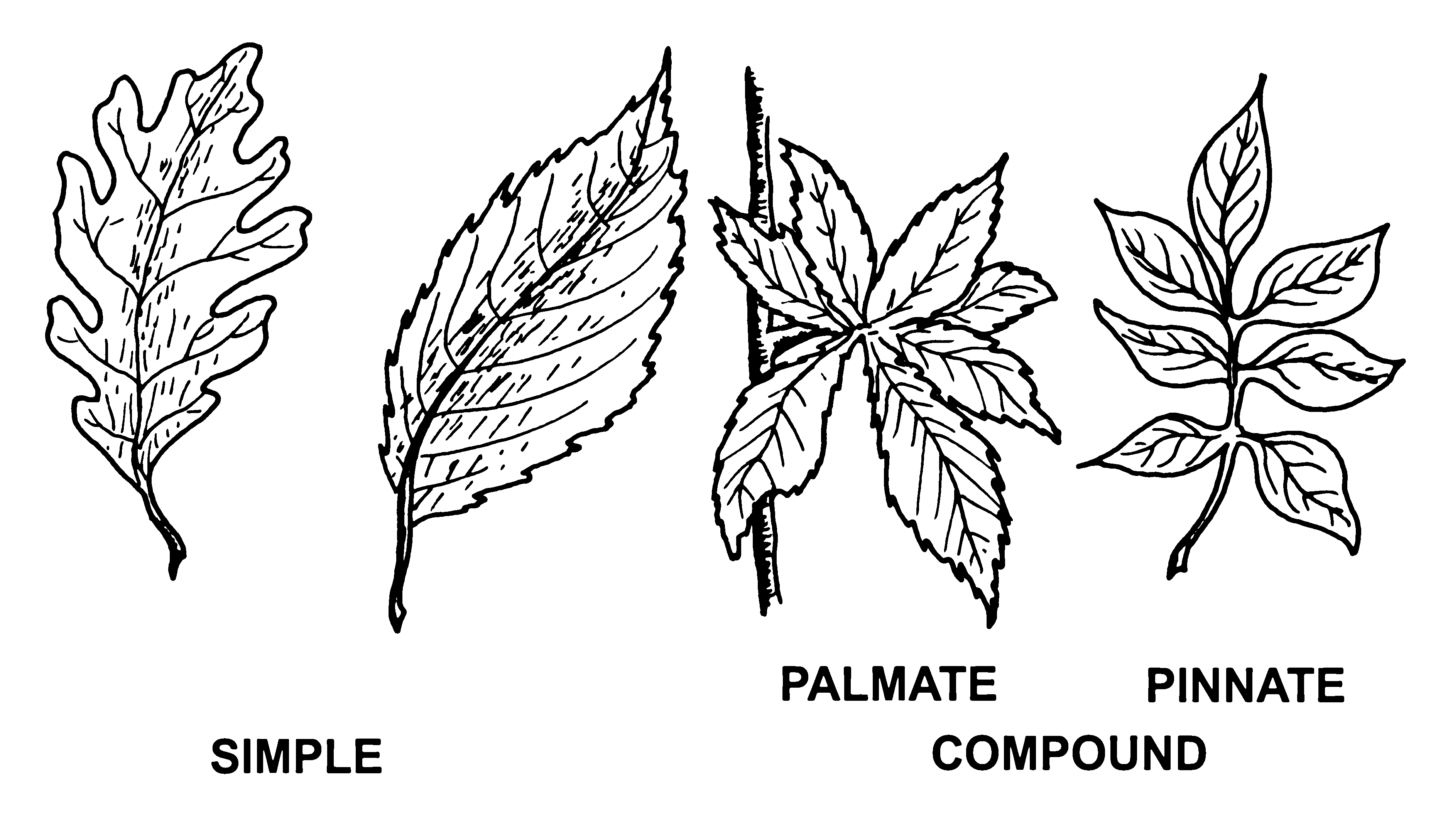 Leafs